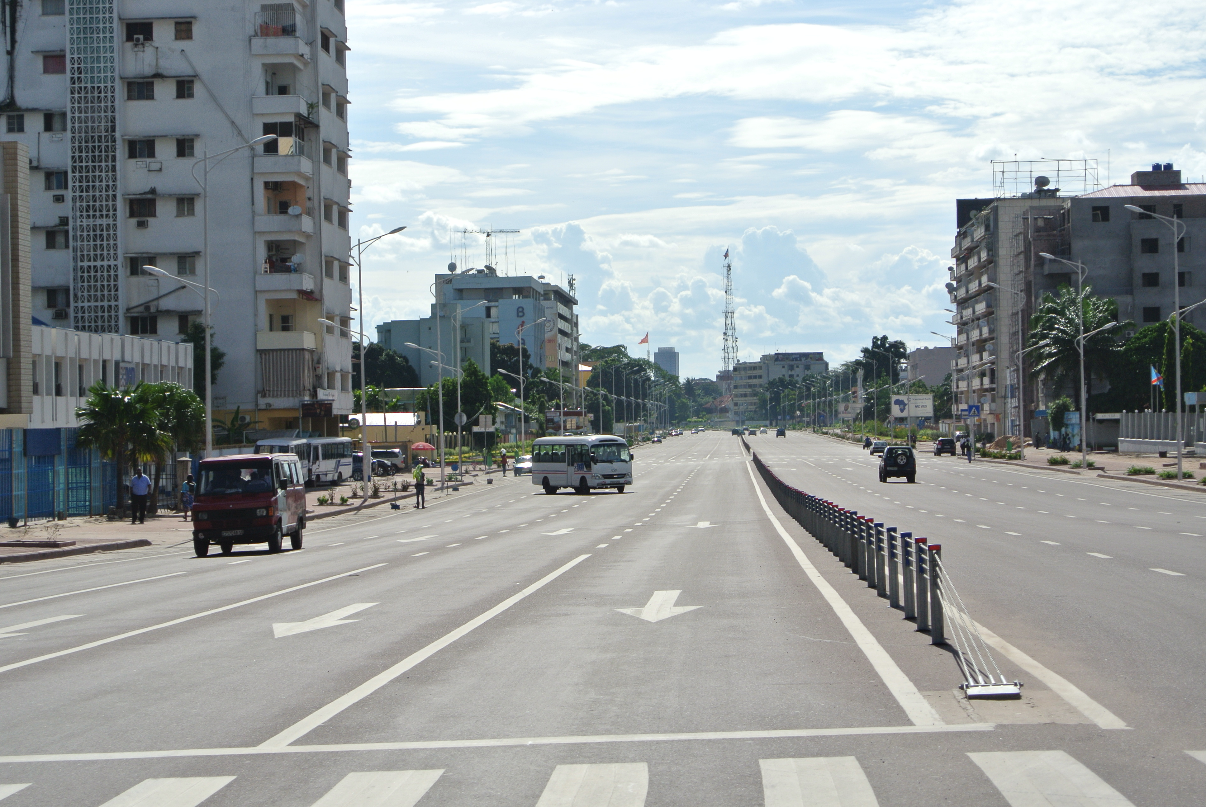 Boulevard du 30 juin, Kinshasa, République Démocratique du Congo - 2013